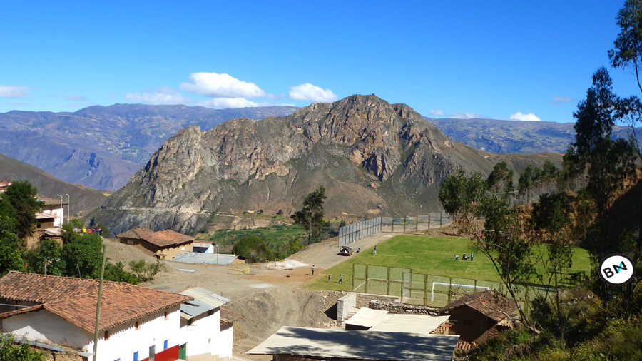 Declarado Patrimonio cultural de la Nación el 18 de junio de 2002 por Resolución directoral Nº 538 del Instituto Nacional de Cultura